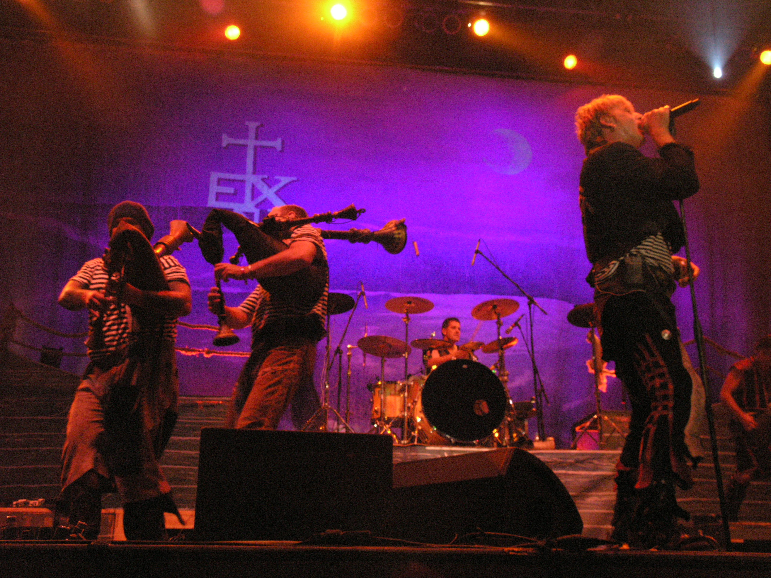 Zespół In Extremo w czasie festiwalu Masters of Rock 2007